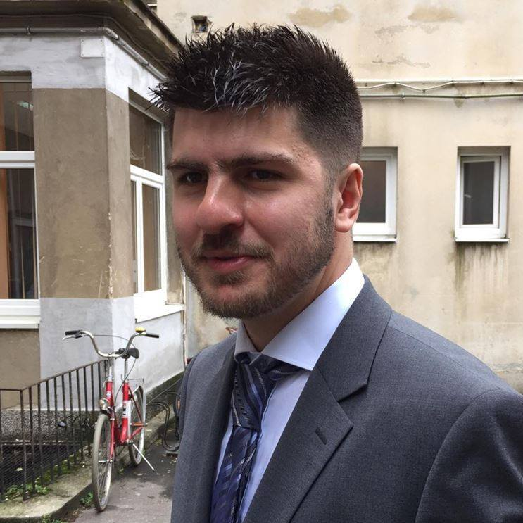 Portret Mateja Kneževića